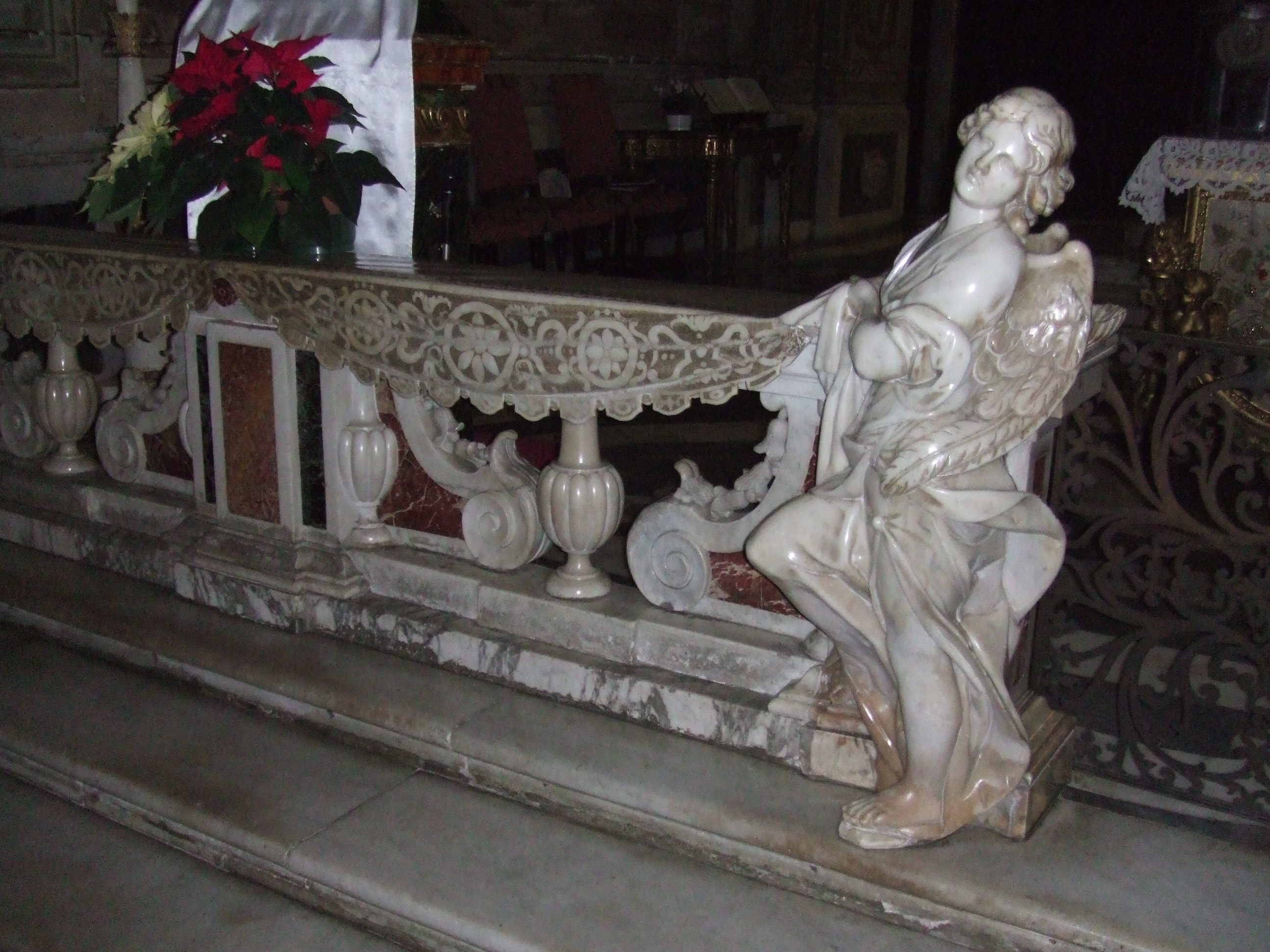 Barrière d'autel de la collégiale San Biagio (Finalborgo)